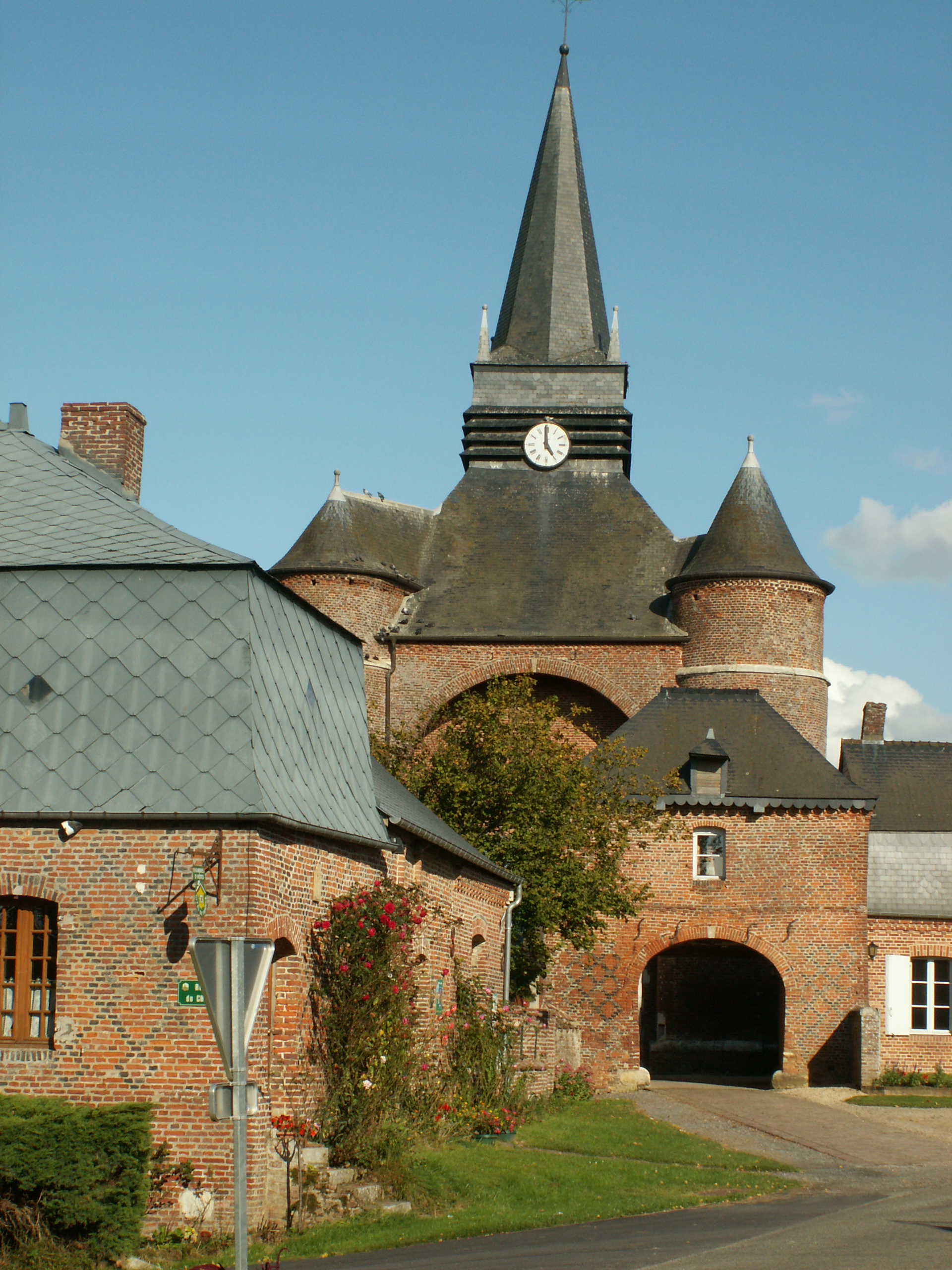 Village de Parfondeval, église fortifiée, département de l'Aisne. .